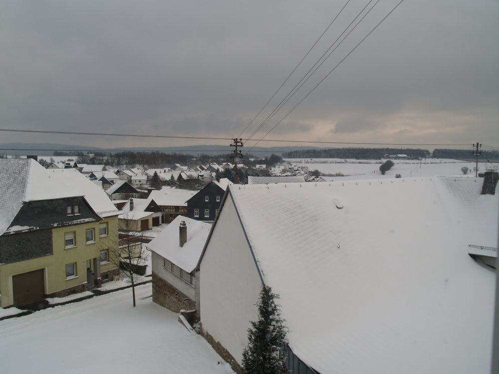 Village Holzbach / Hunsrück